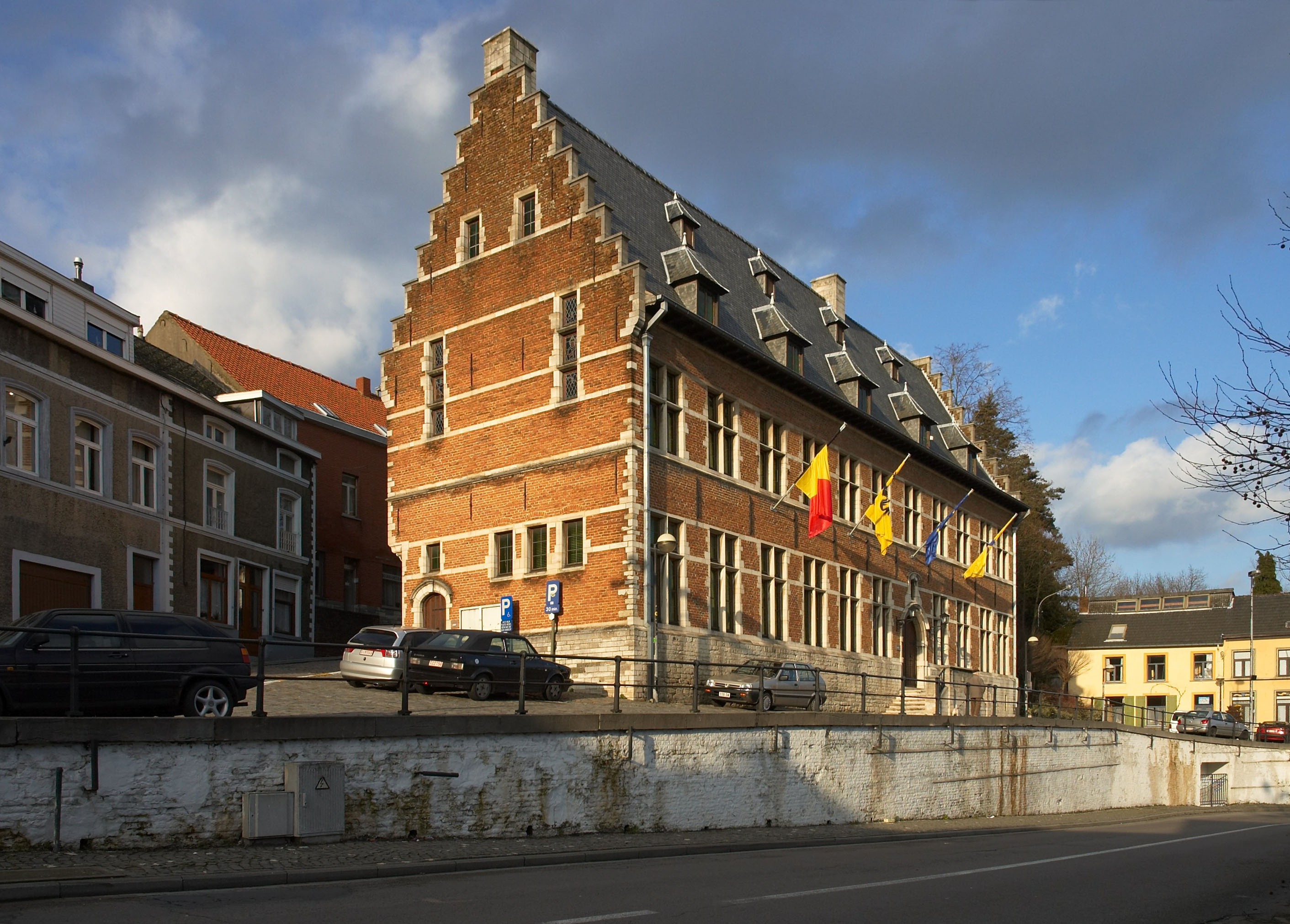 Gemeentehuis, Justus Lipsiusplein 9, 3090 Overijse, België, kijkend richting noord-oost.